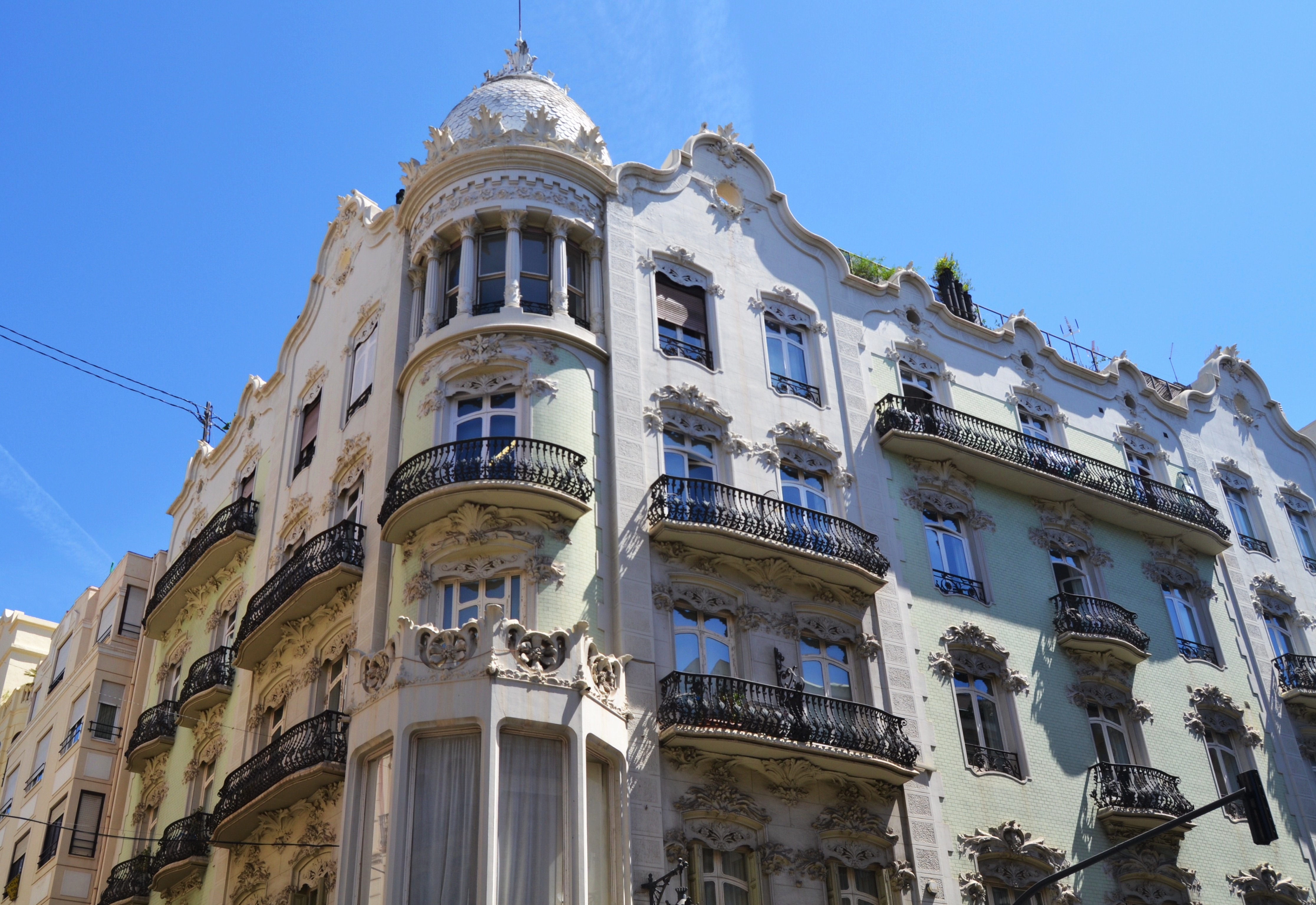 Casa Sagnier II o edifici Gómez II, València.